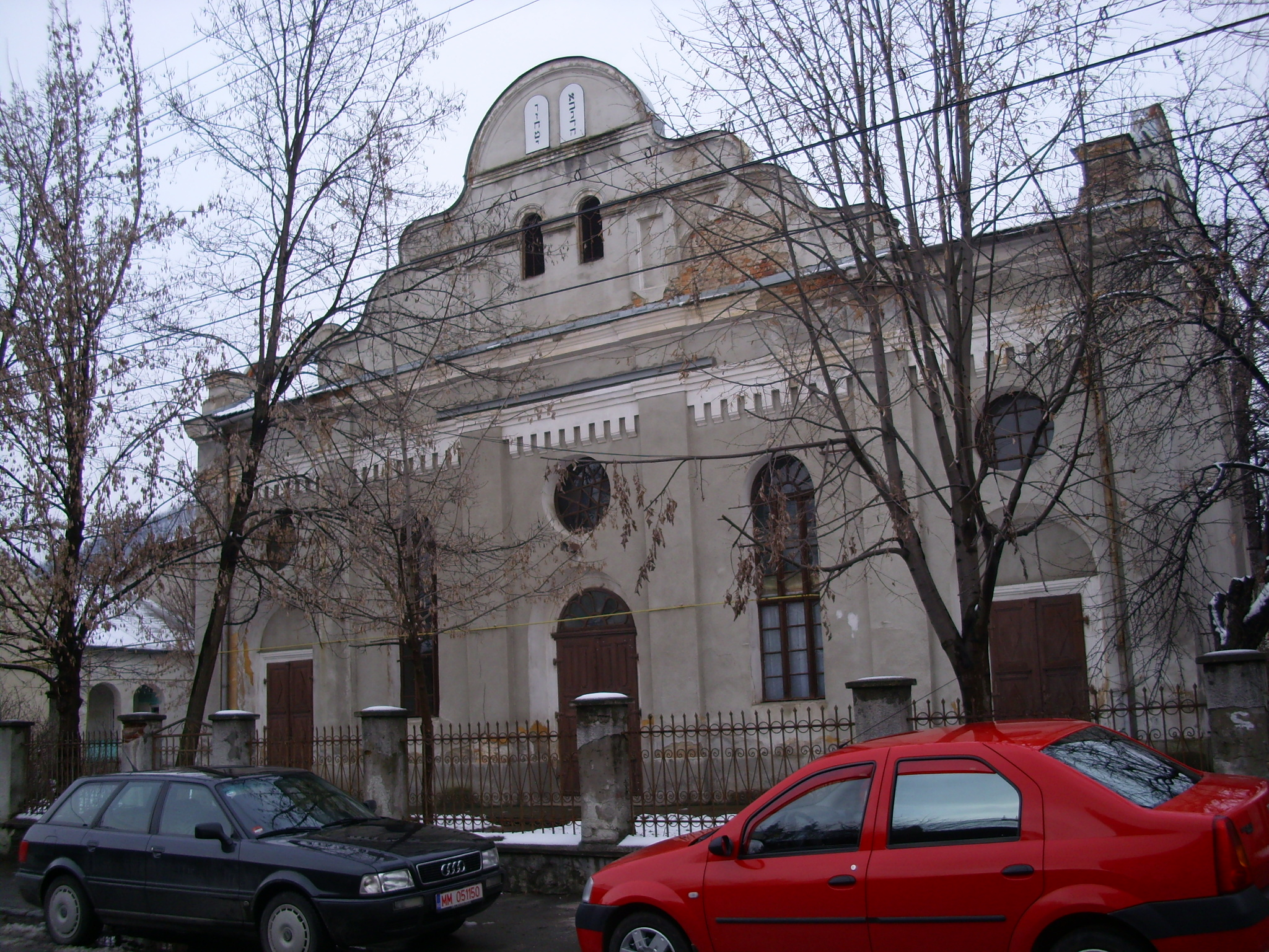 Synagogue, Baia Mare, Romania